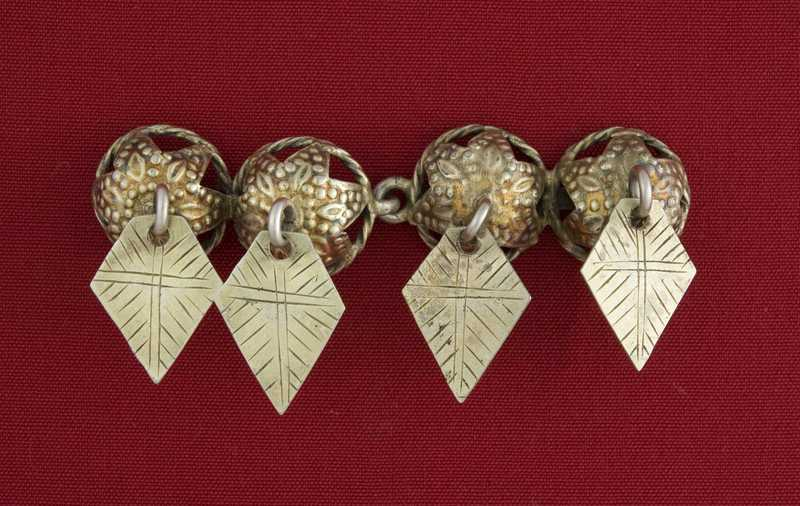 Maljespenne i forgylt sølv fra Flesberg i Buskerud. Foto Anne-Lise Reinsfelt / Norsk Folkemuseum, NF.1914-0385AB.